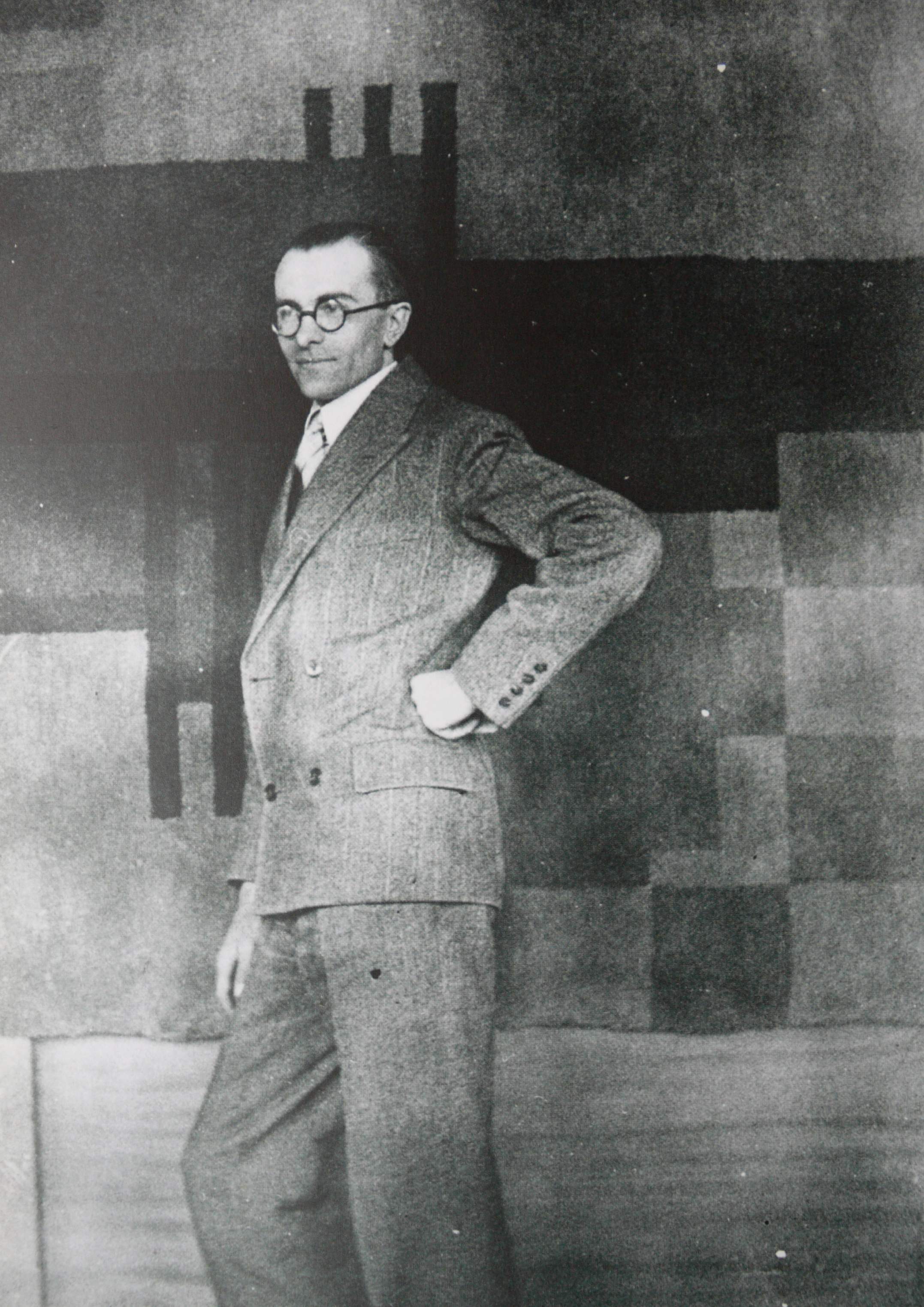 Karel Maes voor één van zijn tapijten, 1929